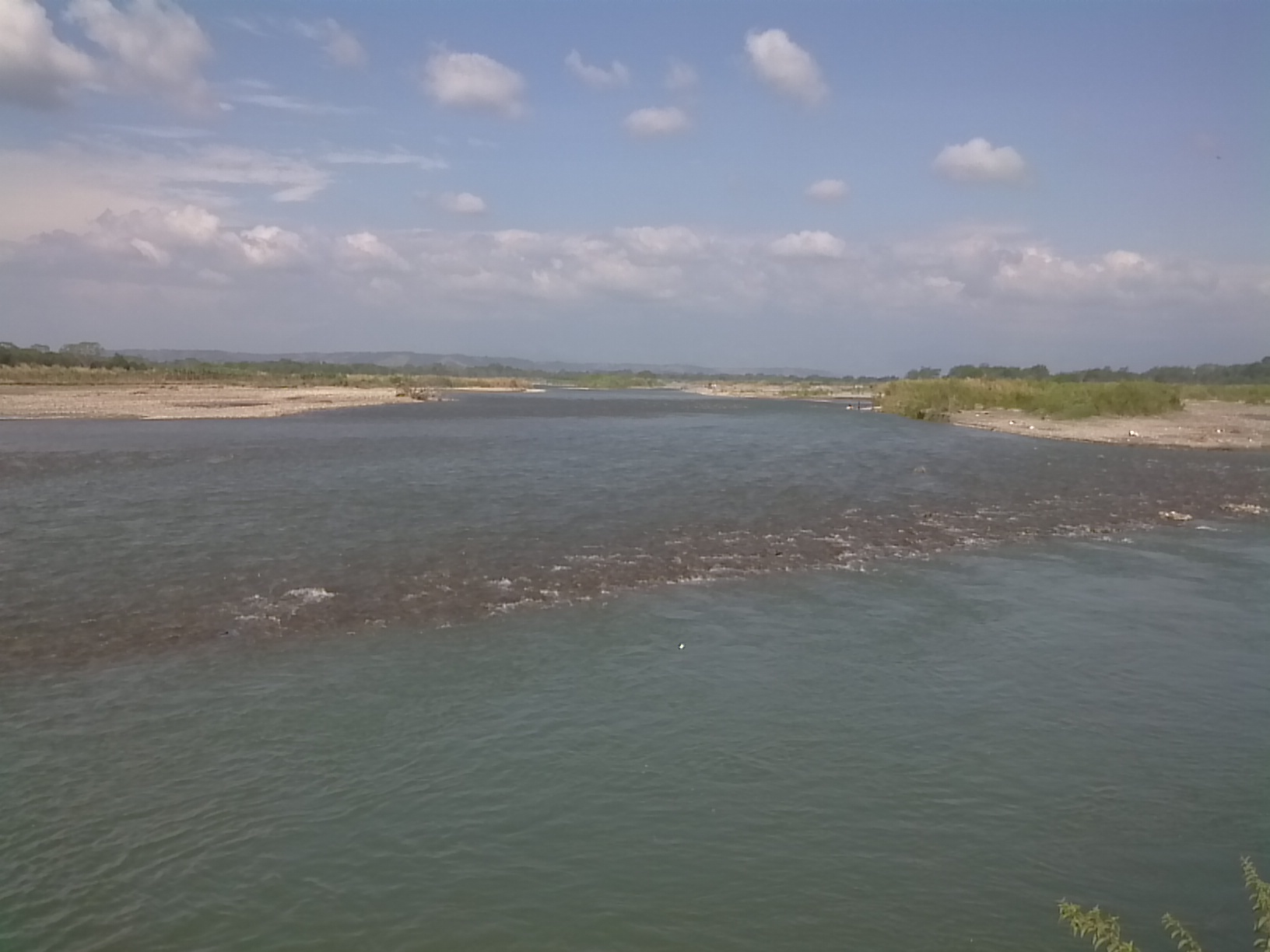 Hermoso río reflejo de la abundancia hídrica de la región Llanera. Esta fotografía fue tomada en el municipio colombiano con código 50389.